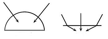 optiek dome